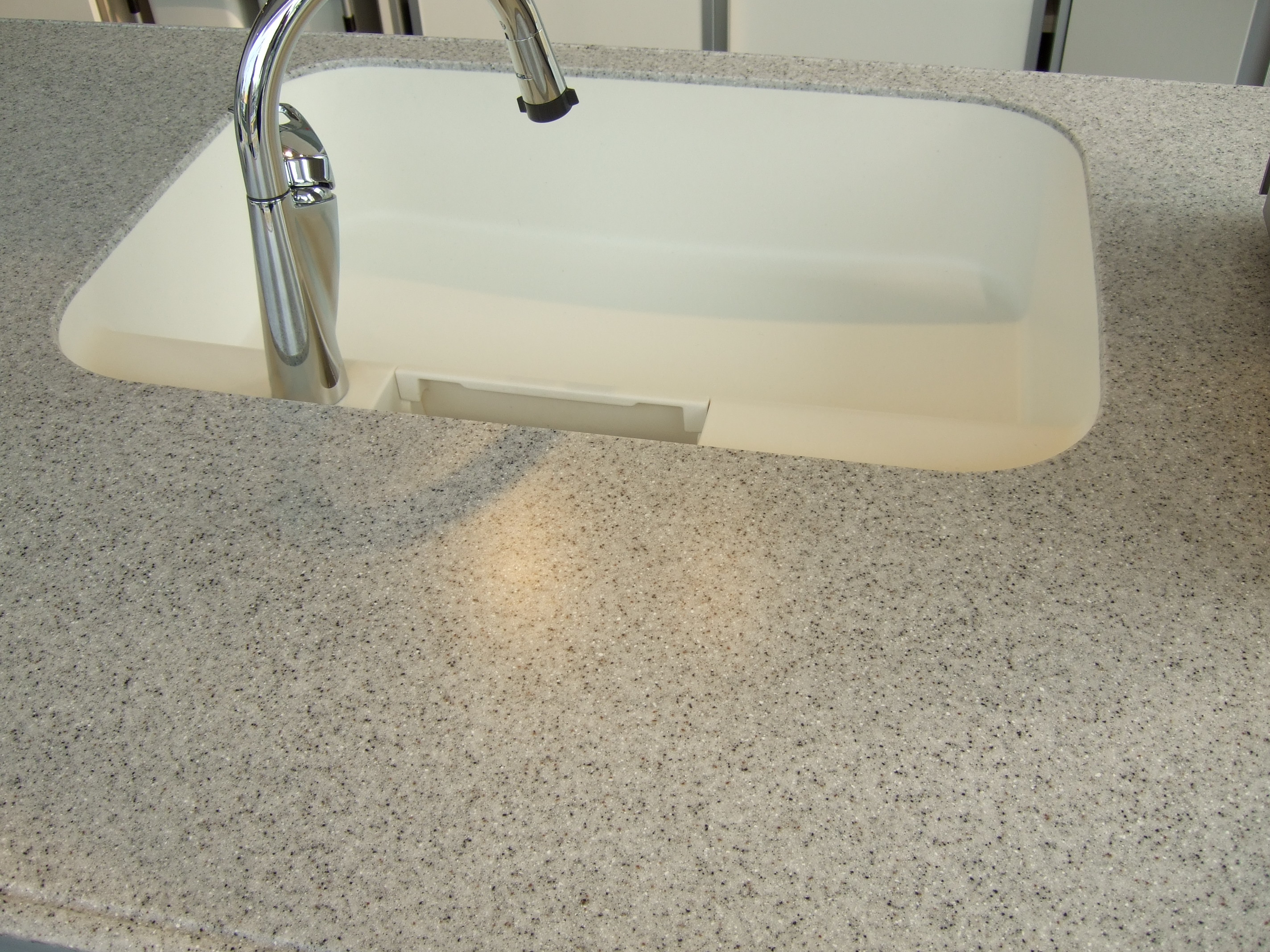 一見テラゾー（人造大理石）のように見える、人工大理石。白色のシンクの部分も人工大理石